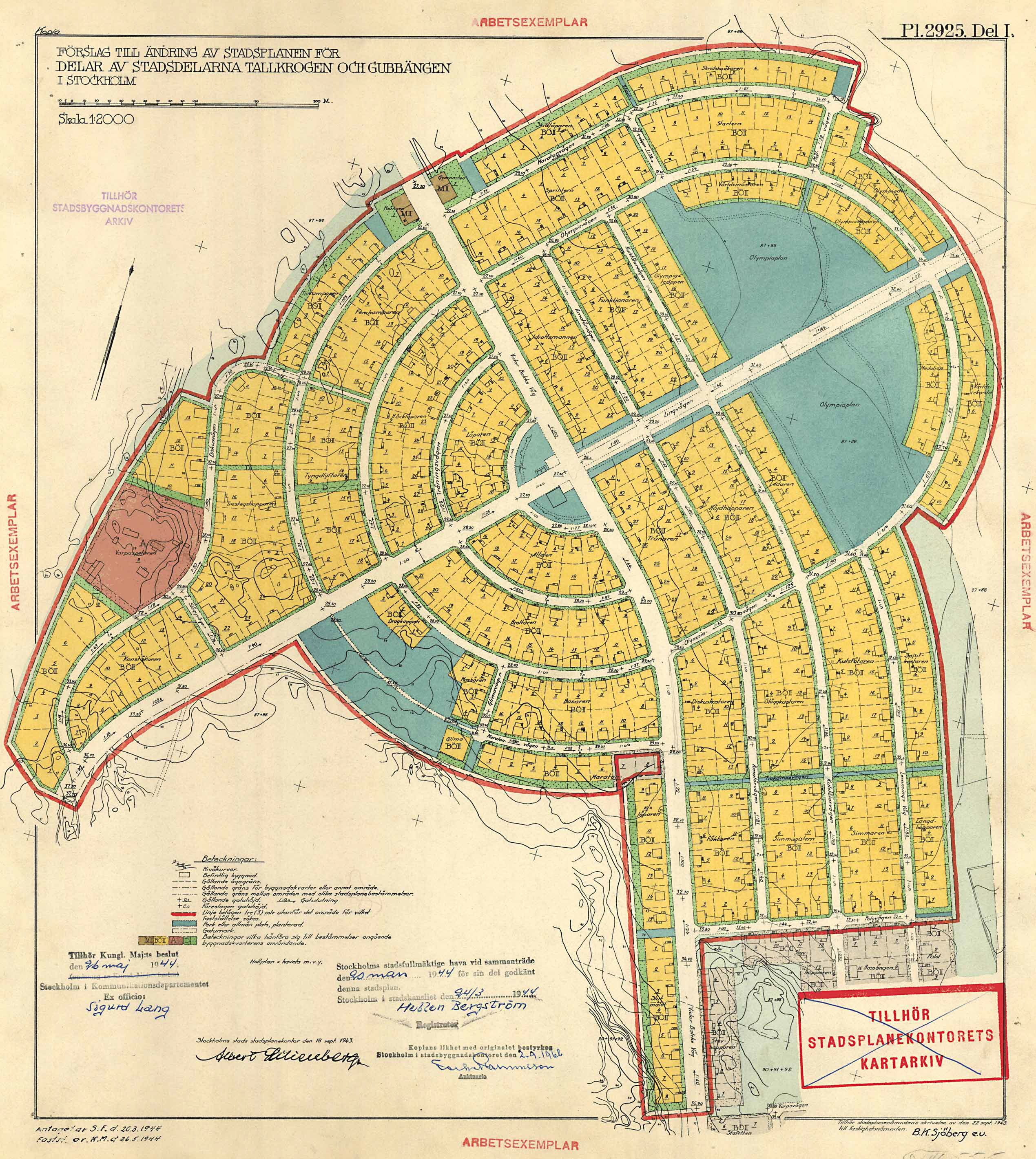 Stadsplan över Tallkrogens "Olympiaområde"